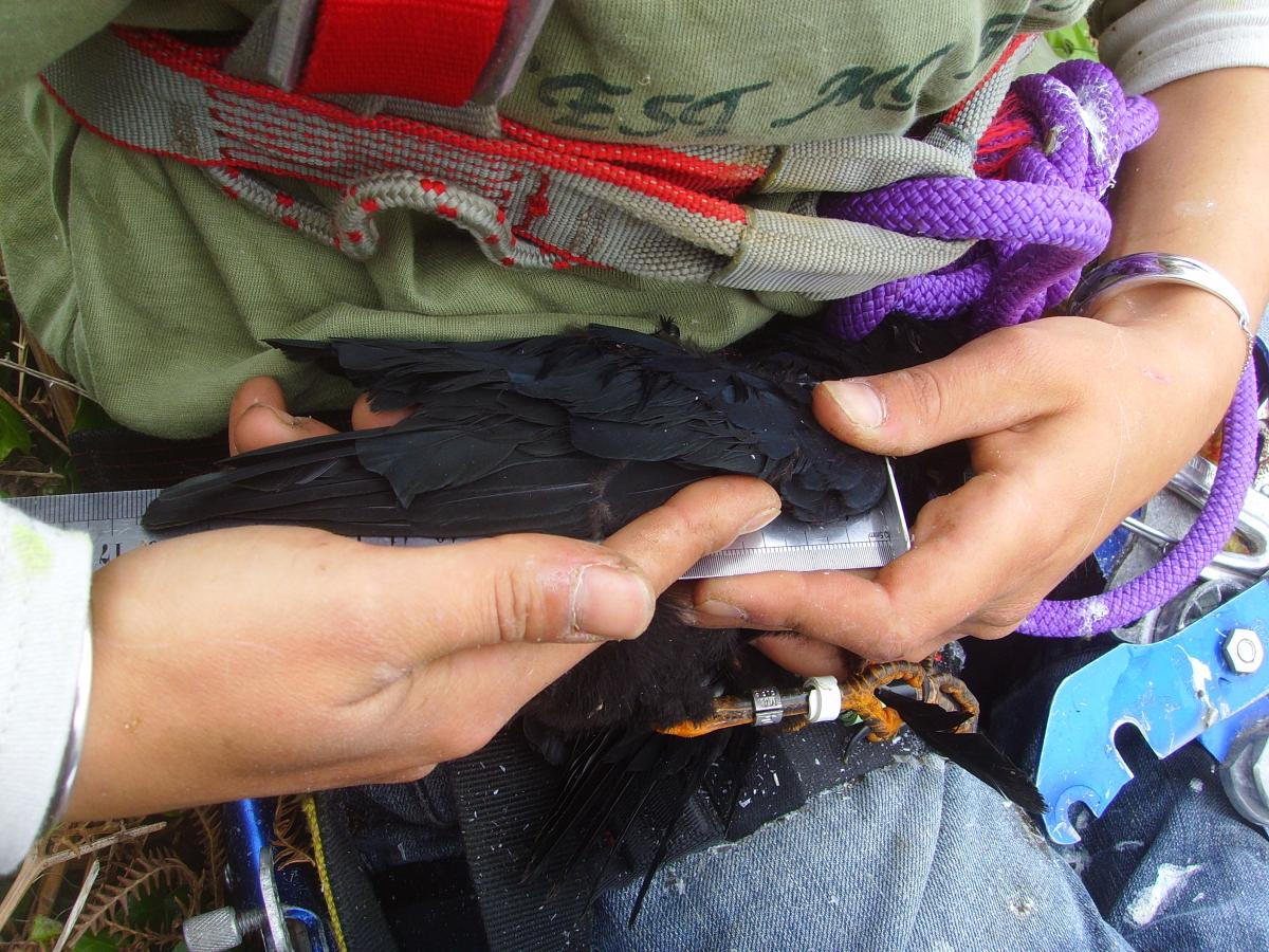 Mesure de l'aile pliée d'un poussin de crave à bec rouge (Pyrrhocorax pyrrhocorax) lors du baguage, Goulien, Finistère, Bretagne, France